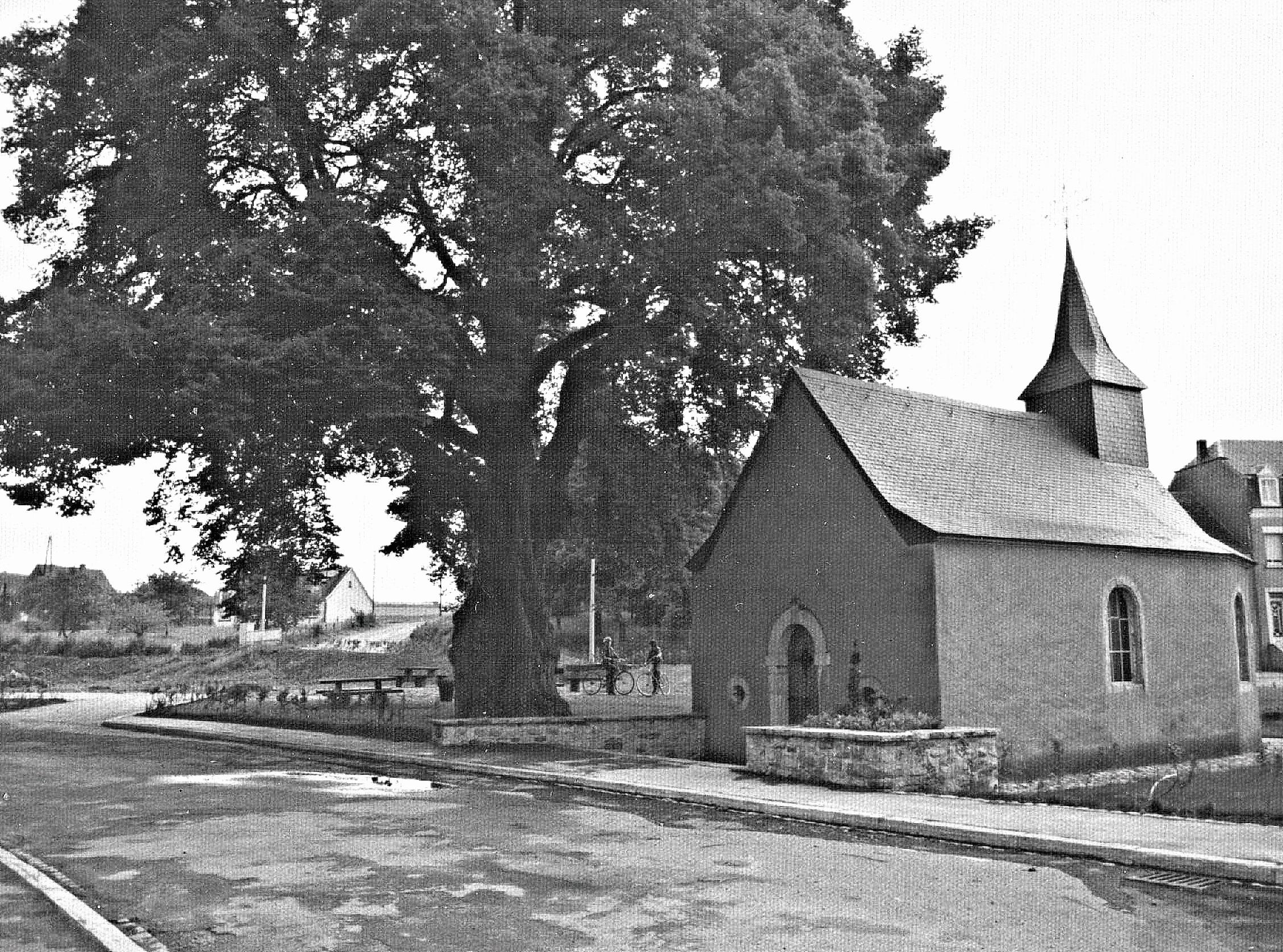 D'Kapell vu Kënzeg mat der Lann, Enn der 60er Joren